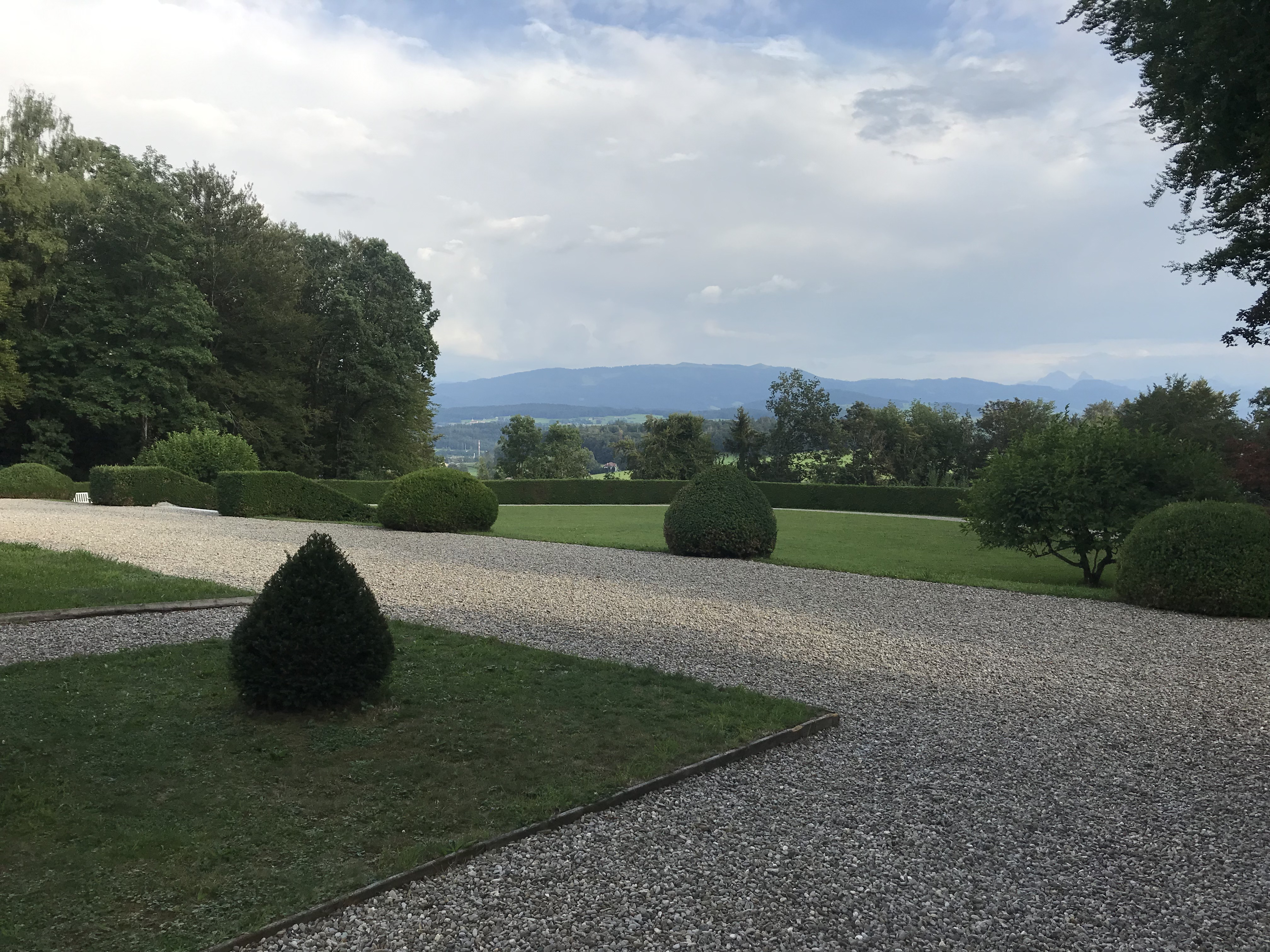 Jardin du Bois-Murat vue Sud